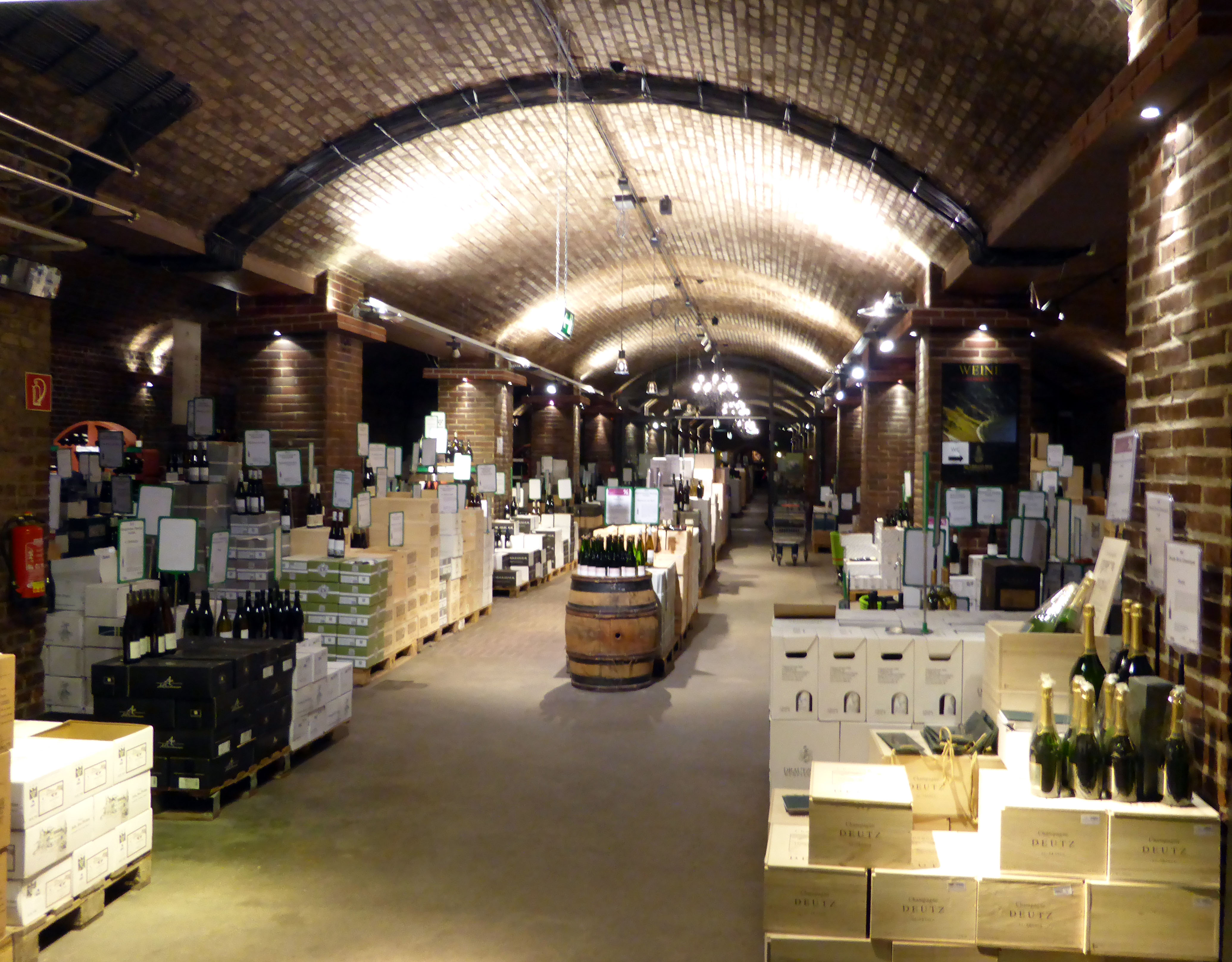 Kölner Weinkeller